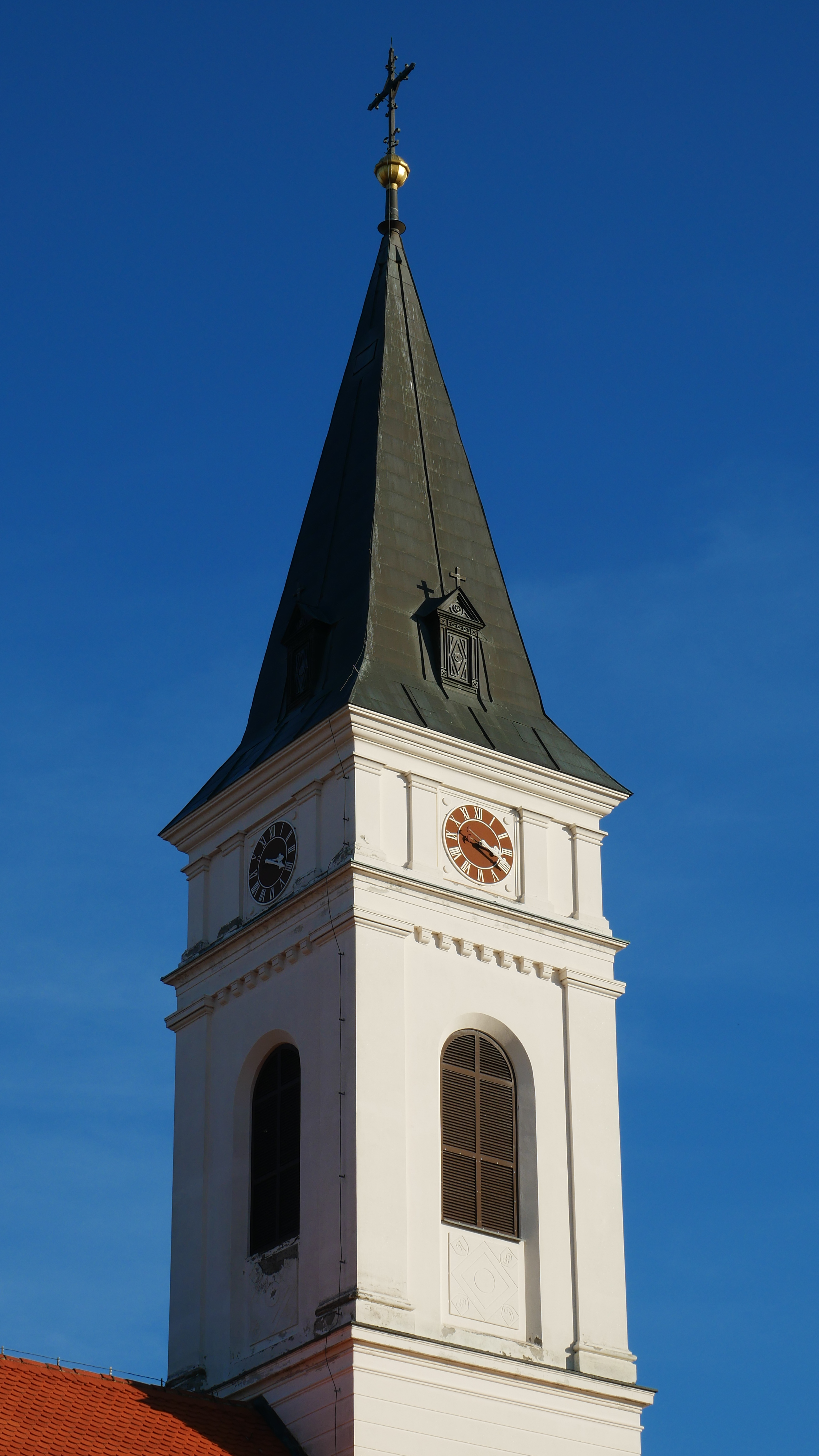 Zvonik crkve sv. Antuna Padovanskog u Podvinju